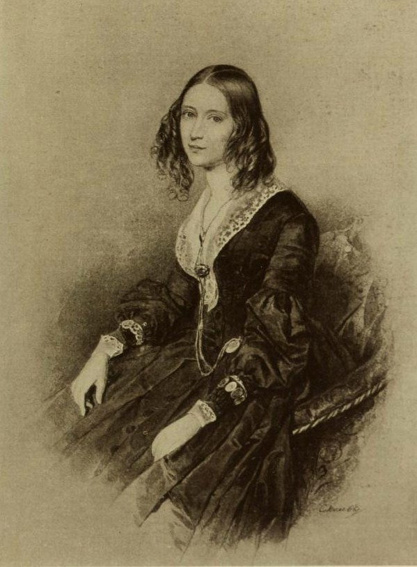 Фанни Александровна Резвая (1816-1846), дочь генерала А.И.Гассинга. Была замужем за полковником Модестом Дмитриевич Резвым (1807-1853).